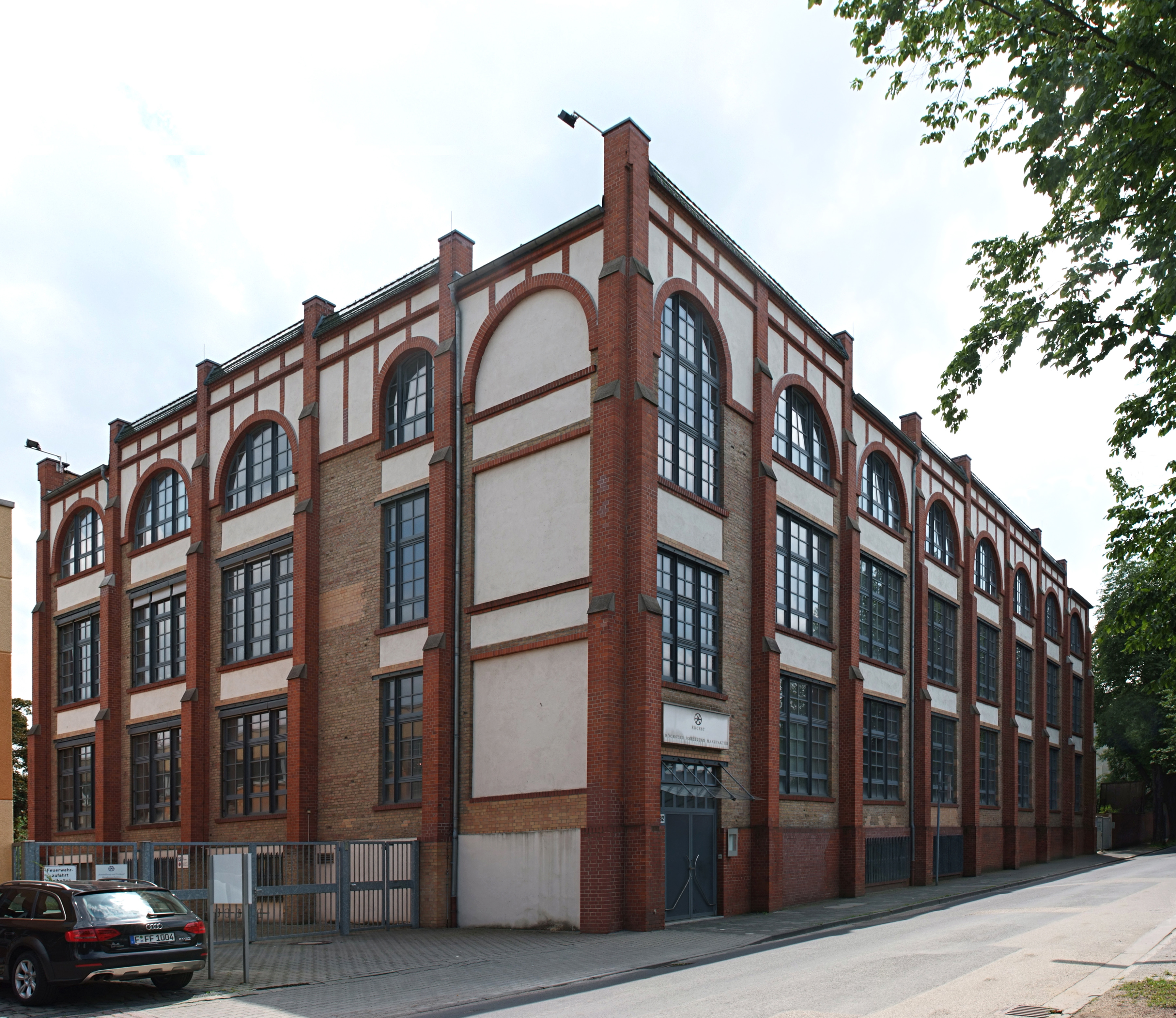 Höchster Porzellanmanufaktur in der Palleskestaße 32 Ehemalige Maschinen- und Armaturenfabrik H. Breuer & Co.